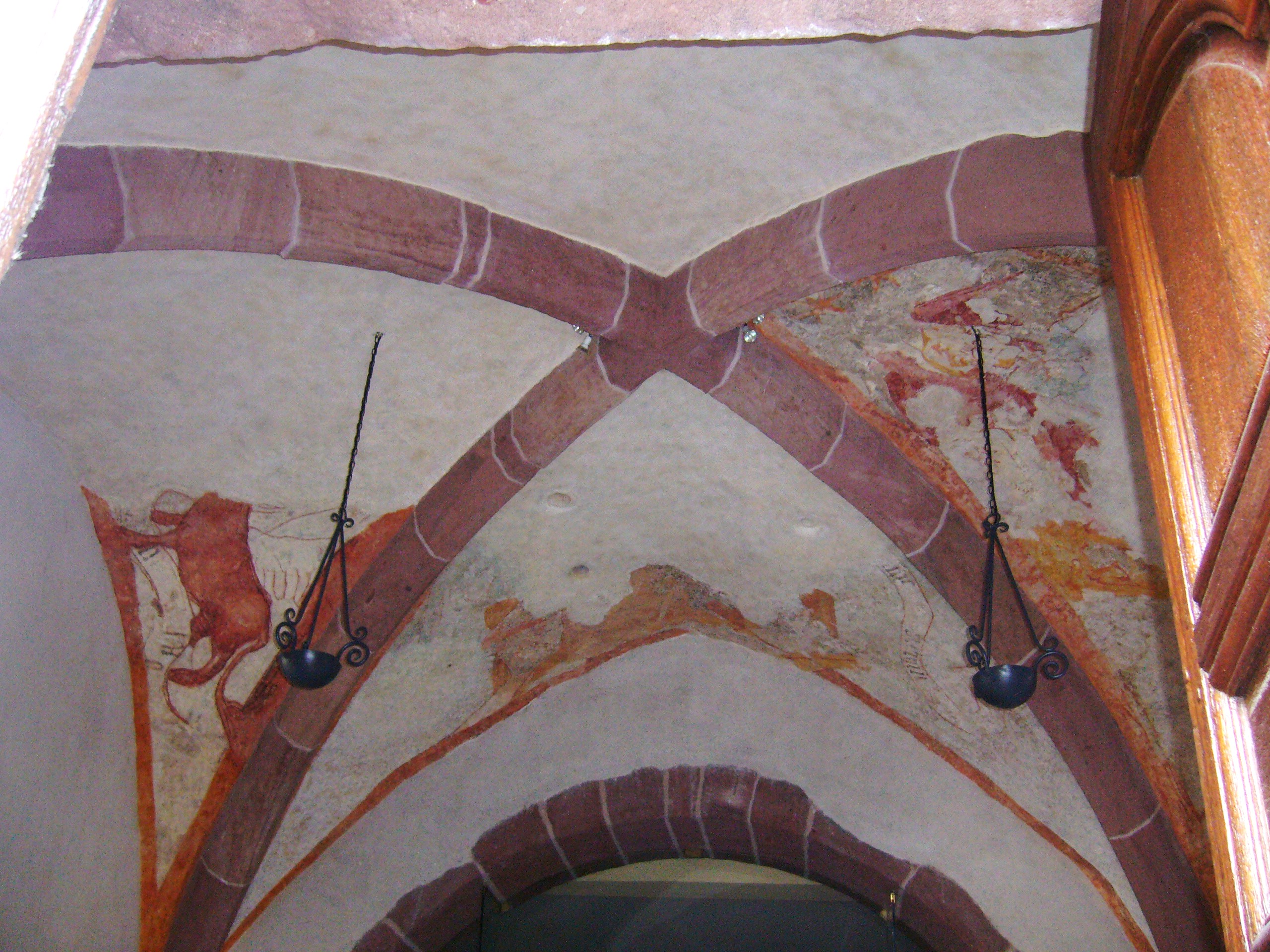 Fresques du XIIIe siècle sous la voûte du clocher de l'église de Lièpvre